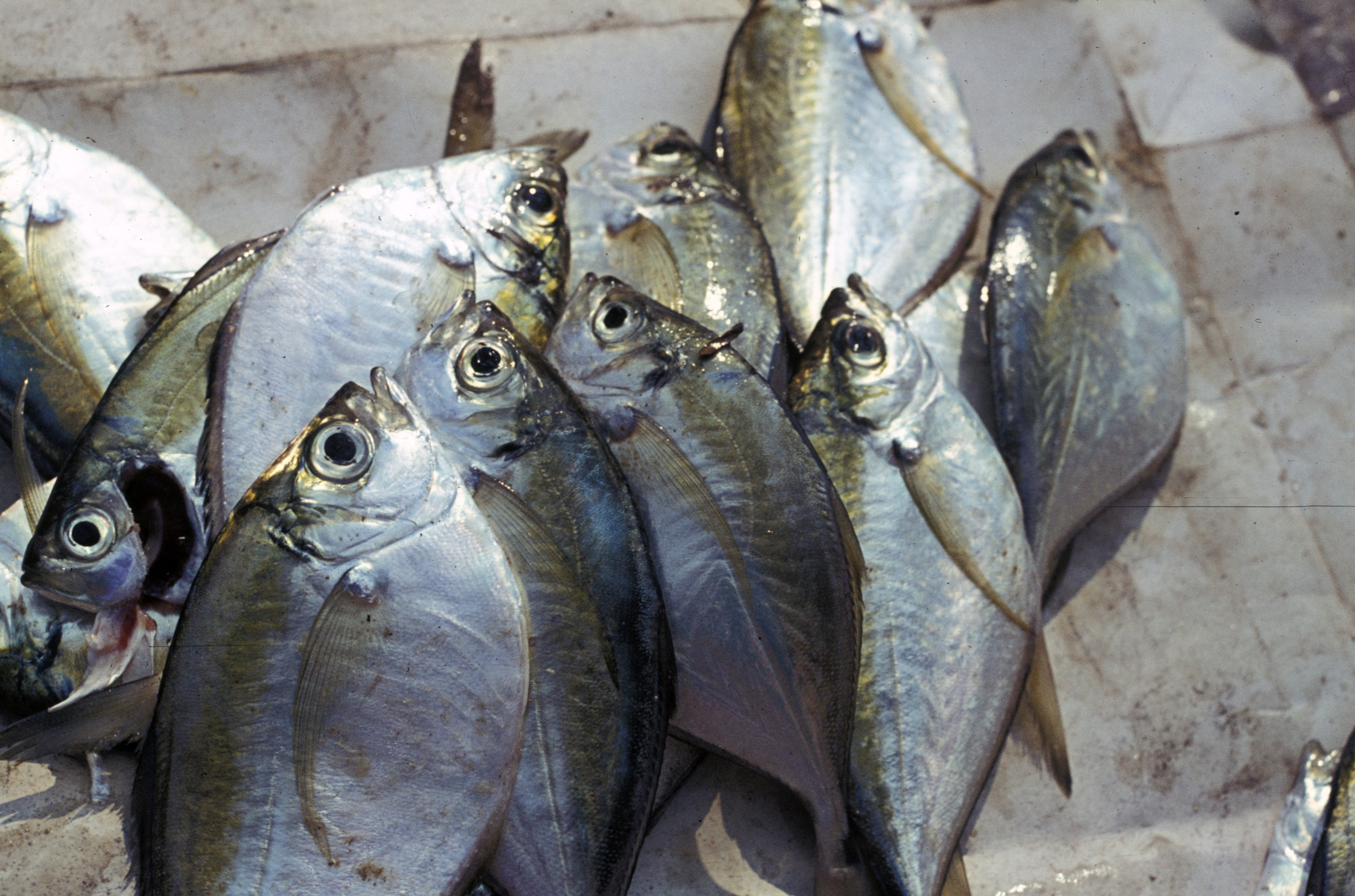 Cameroon